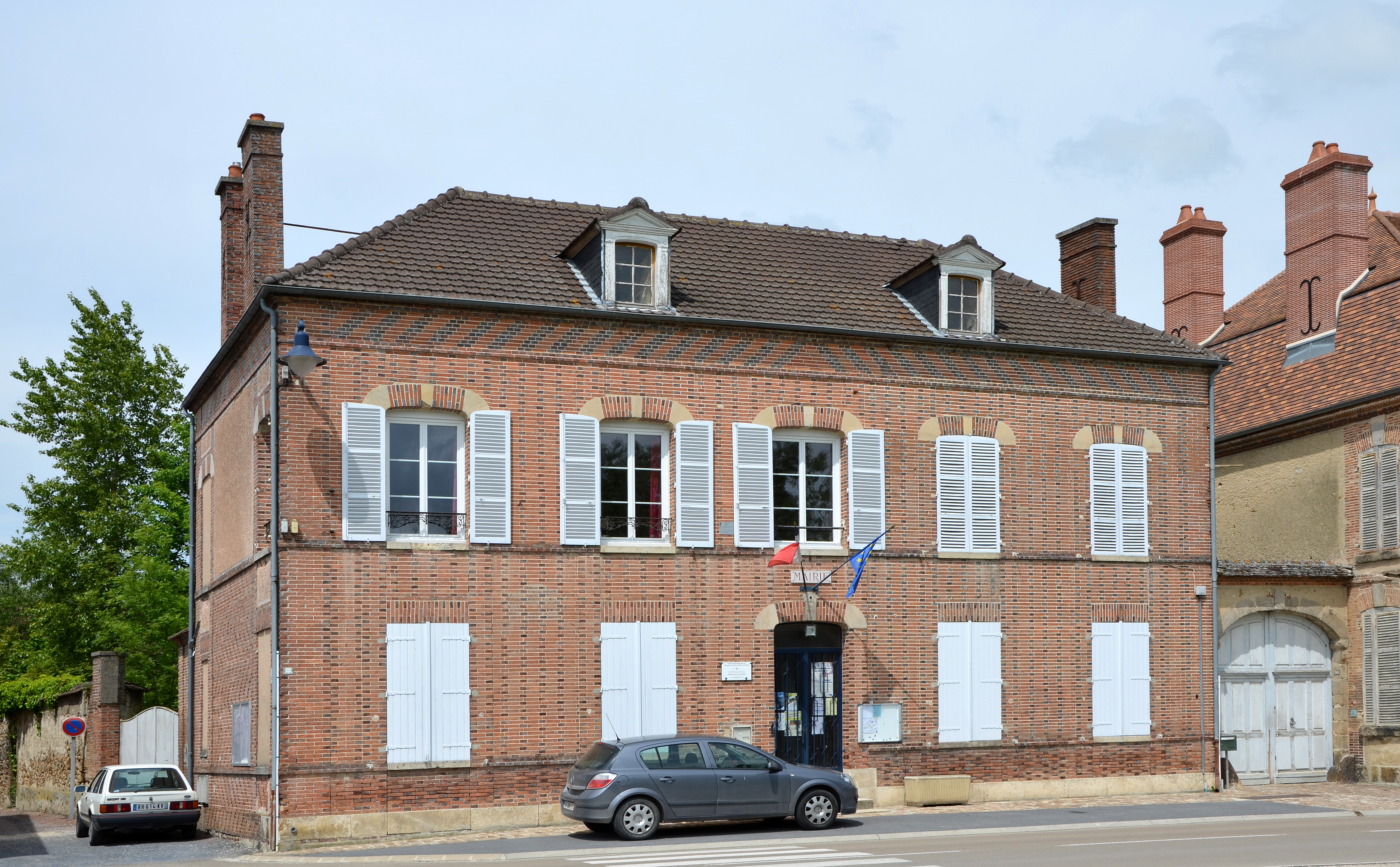 Mairie de Marcilly sur Seine, Marne, France